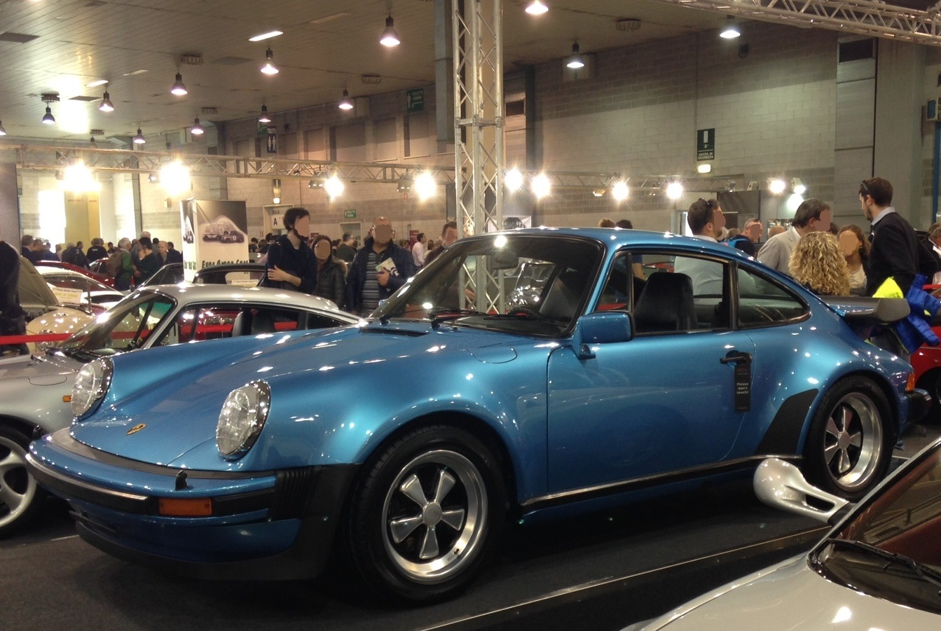 911 Turbo 3.3